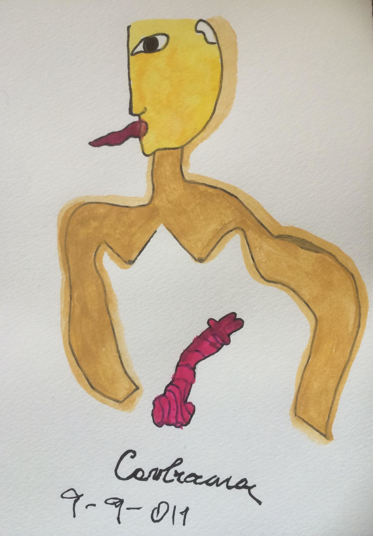 Opera del 2004